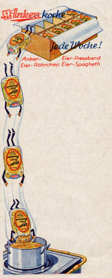 Einkaufszettelblock als Werbebeigabe der Firma Loeser & Richter, Löbau